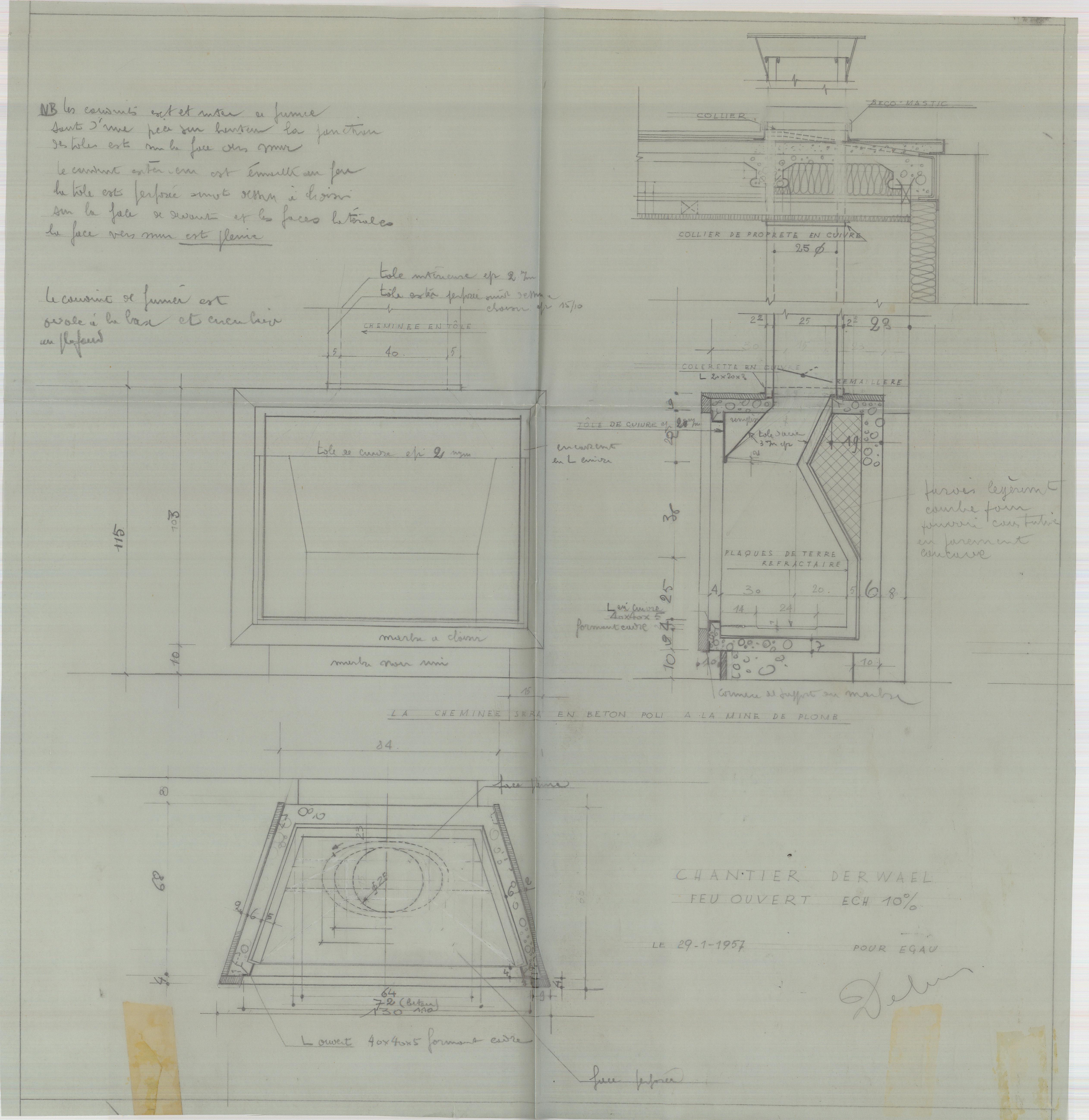 foyerderwael